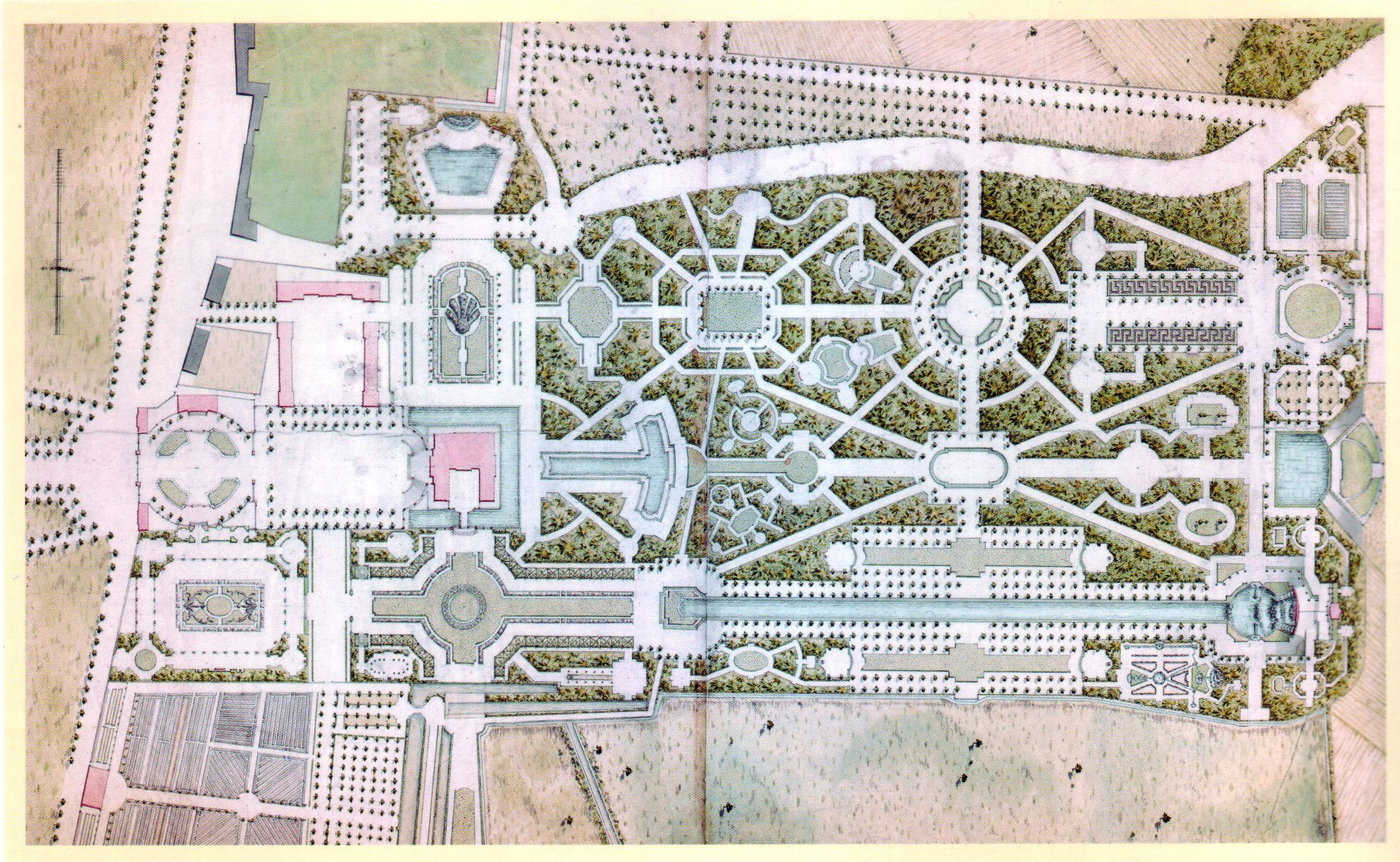 Wandsbeker Schlosspark, Plan von Carl Gottlob Horn 1767/68